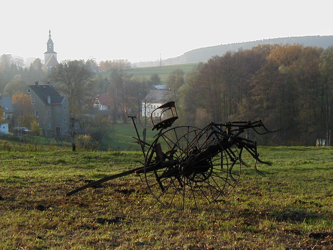 Blick auf Frankenstein in Sachsen, Anfang November 2000, ein Gabelheuwender im Vordergrund